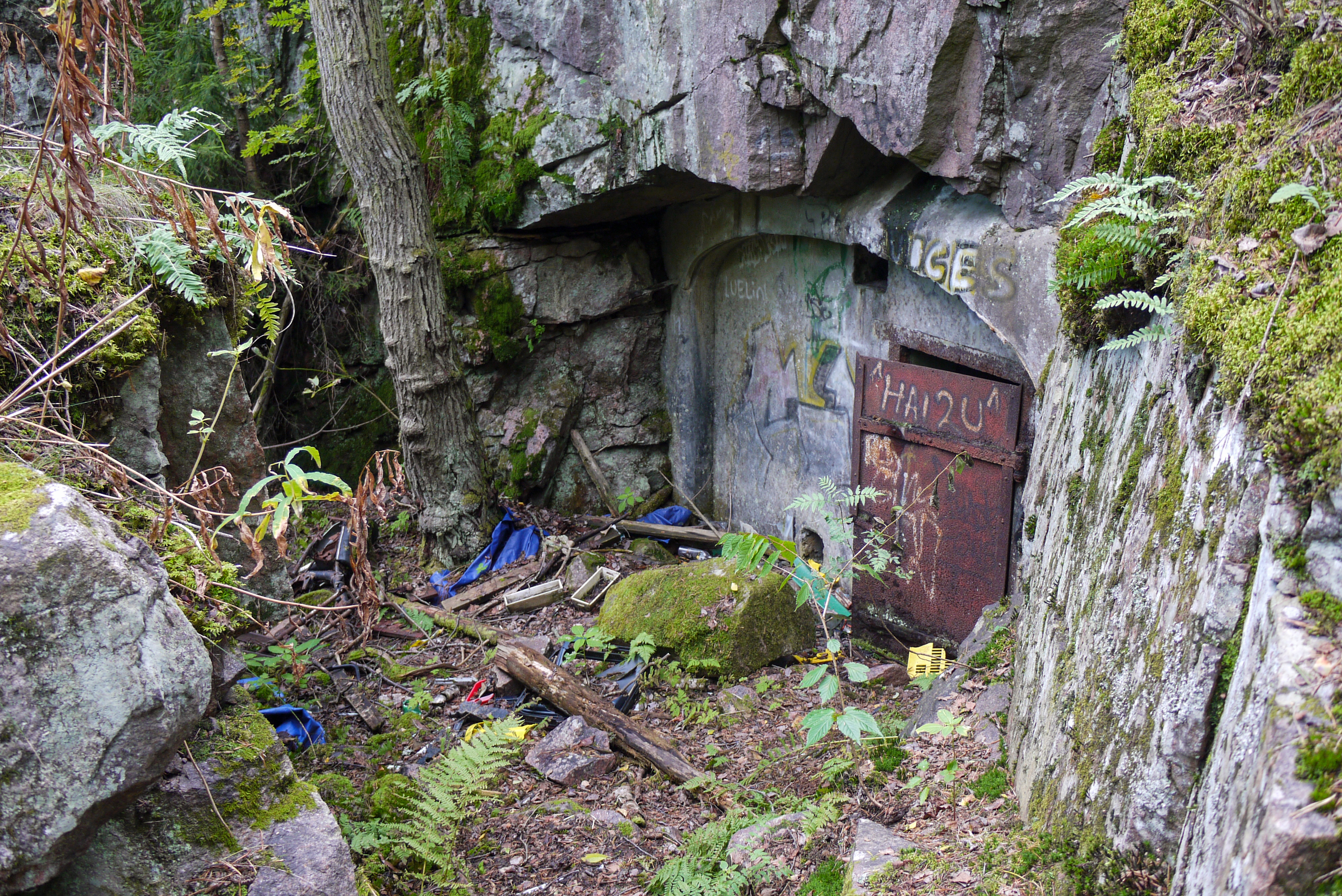 Varastoluolan sisäänkäynti Krepost Sveaborgin tukikohta XXXIV:n asema 2:n alueella Espoon Haukilahdessa. Luolan edustaa ja lähialueen yhdyshautoja on käytetty kaatopaikkana.